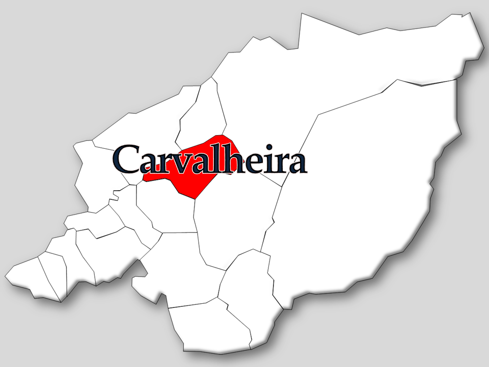 Censos 1864/2011